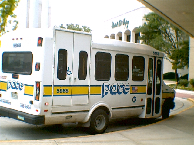 Pace paratransit vehicle.